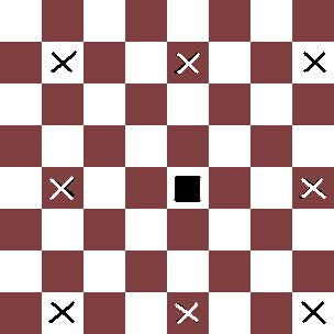 Ritmomàquia: moviment de la peça quadrada